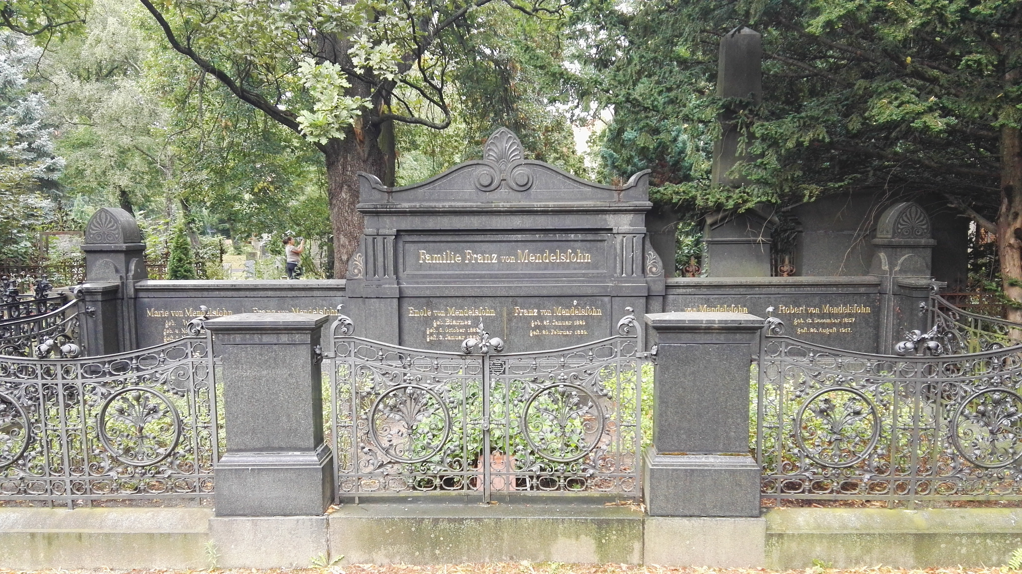 Grab von Franz von Mendelssohn (1829-1889), Bankier, und Franz von Mendelssohn (der Jüngere) (1865-1935), Bankier, und Robert von Mendelssohn (der Ältere) (Maler; Friedhof I der Gemeinde Jerusalems- und Neue Kirche